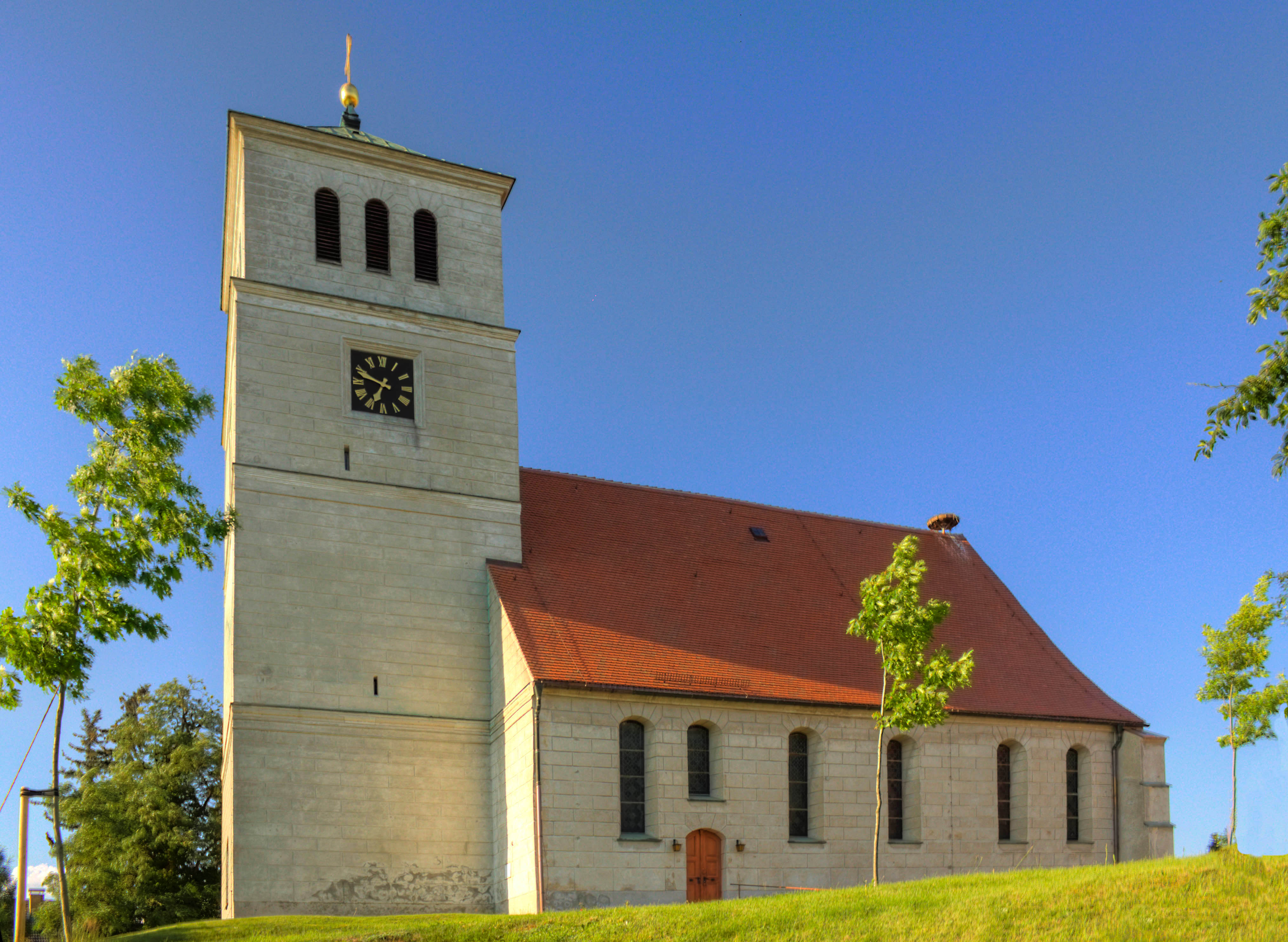 Stadtkirche St. Marien, Kirchberg 1 in Schildau